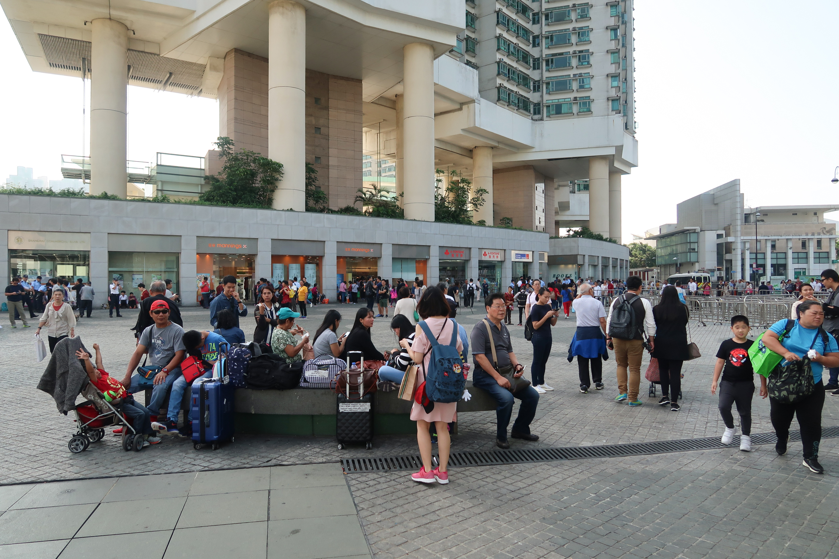 Mainland tourist in Tung Chung